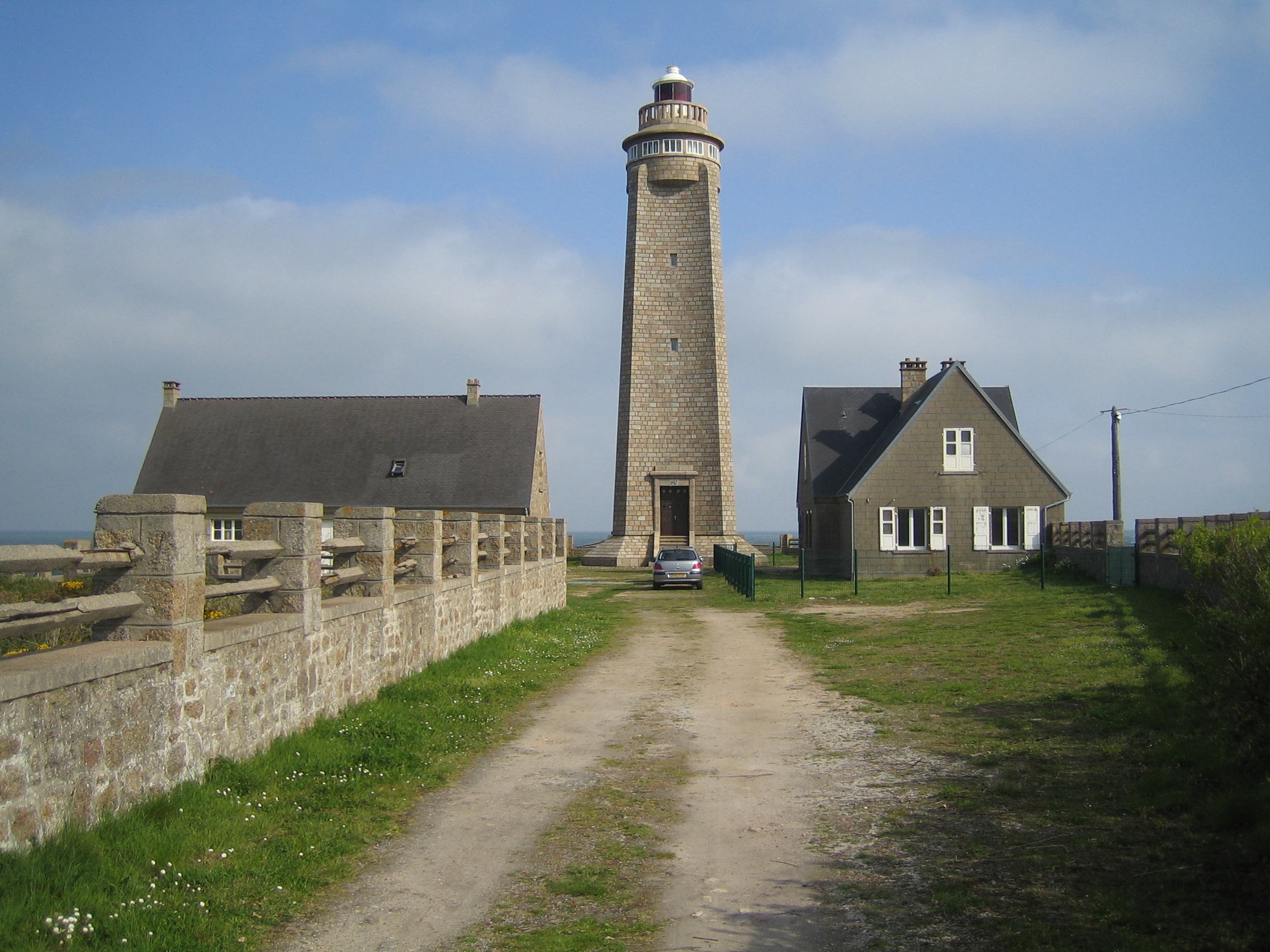 Phare du Cap Lévy (Cotentin, France, near Cherbourg)